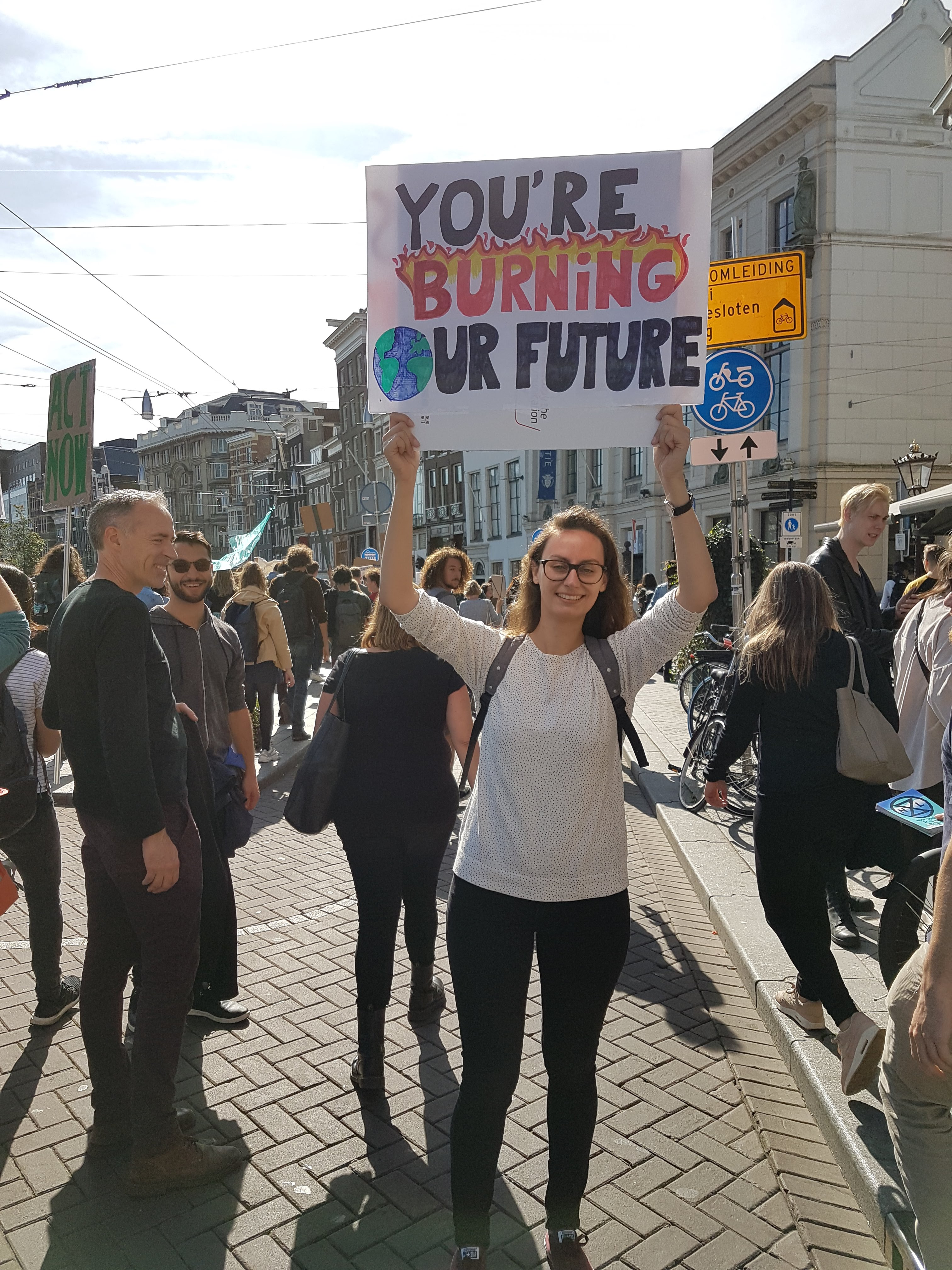 Klimaatdemonstratie op vrijdag 20 september 2019 in Amsterdam Centrum